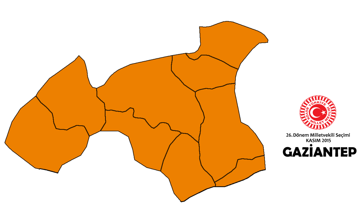 Kasım 2015 seçimleri